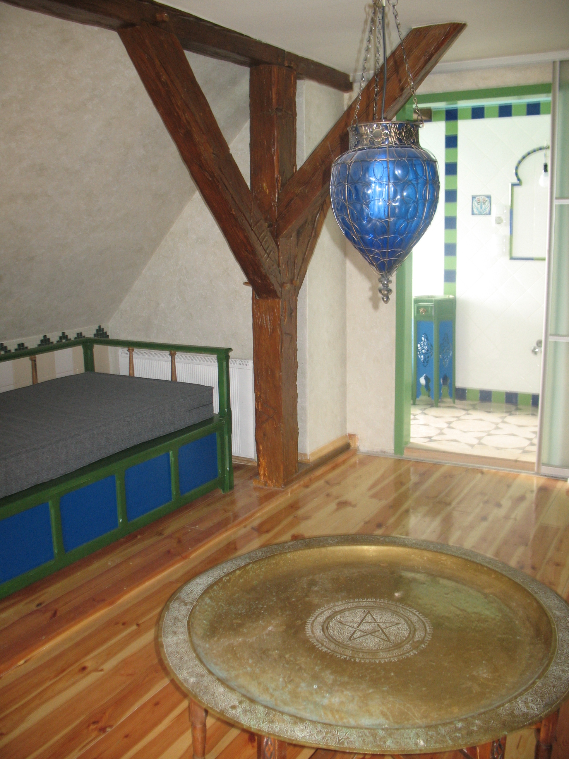 pokój